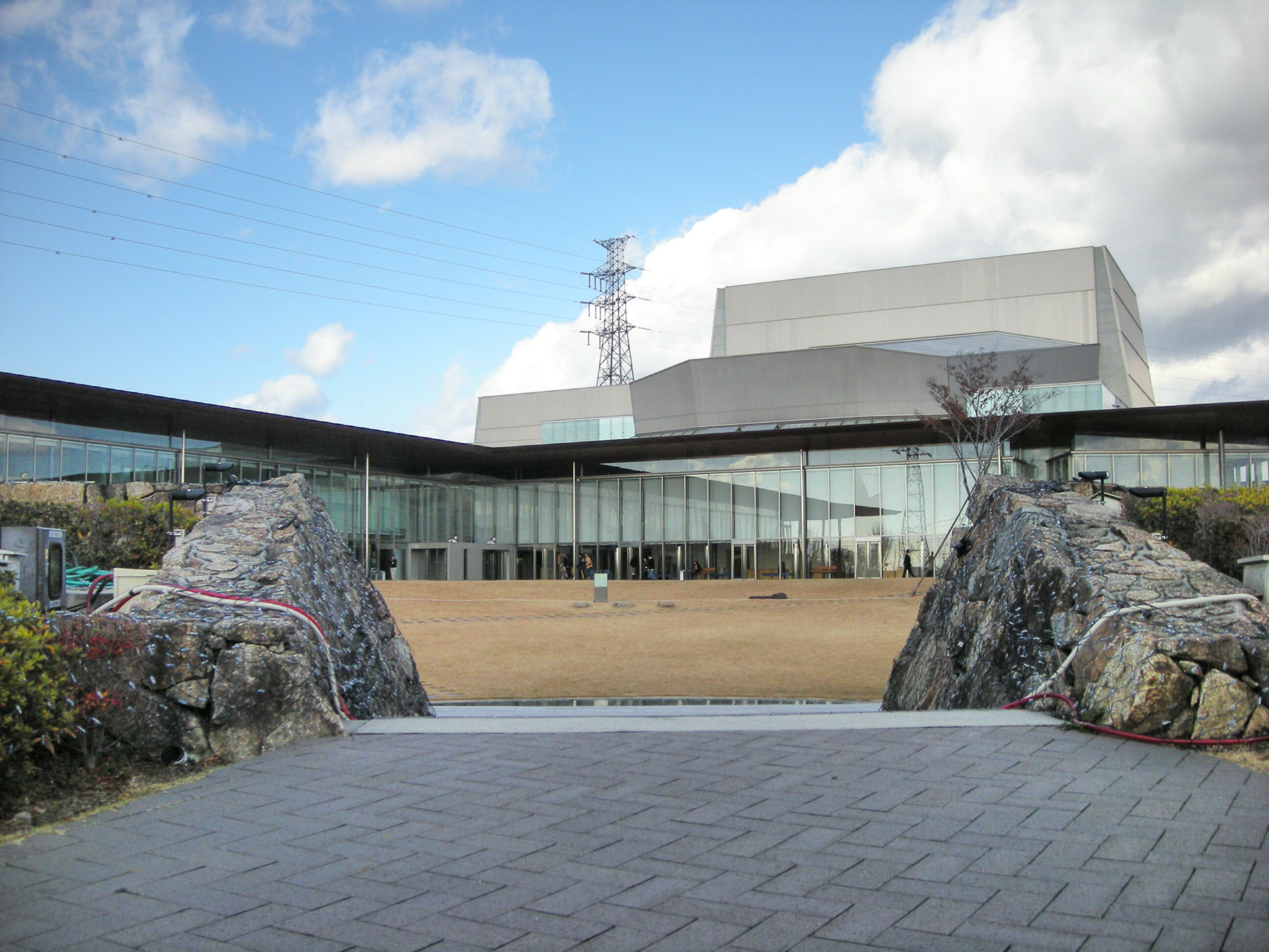 Kani Public Arts Center（可児市文化創造センター）